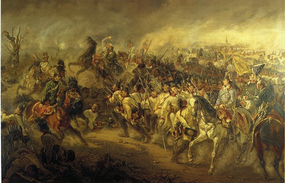 Feldmarschall-Lieutenant Fürst Karl Alois zu Fürstenberg in der Schlacht bei Liptingen